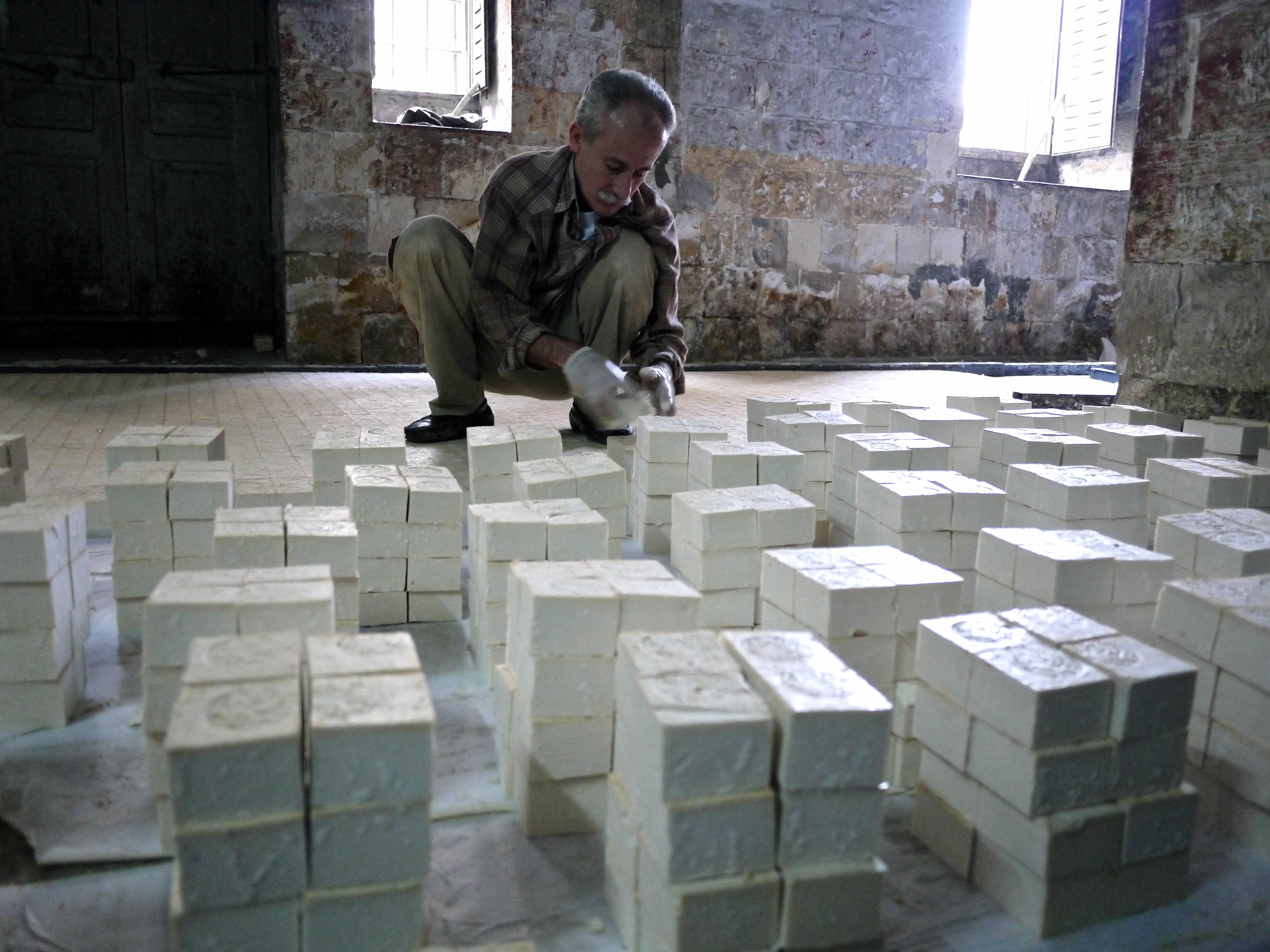 Una delle ultime fabbriche di sapone di Nablus.